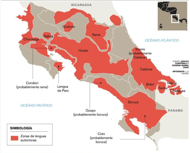 La imagen contiene un maca con la distribución aproximada de las lenguas indígenas de Costa Rica antes de la llegada de los españoles.